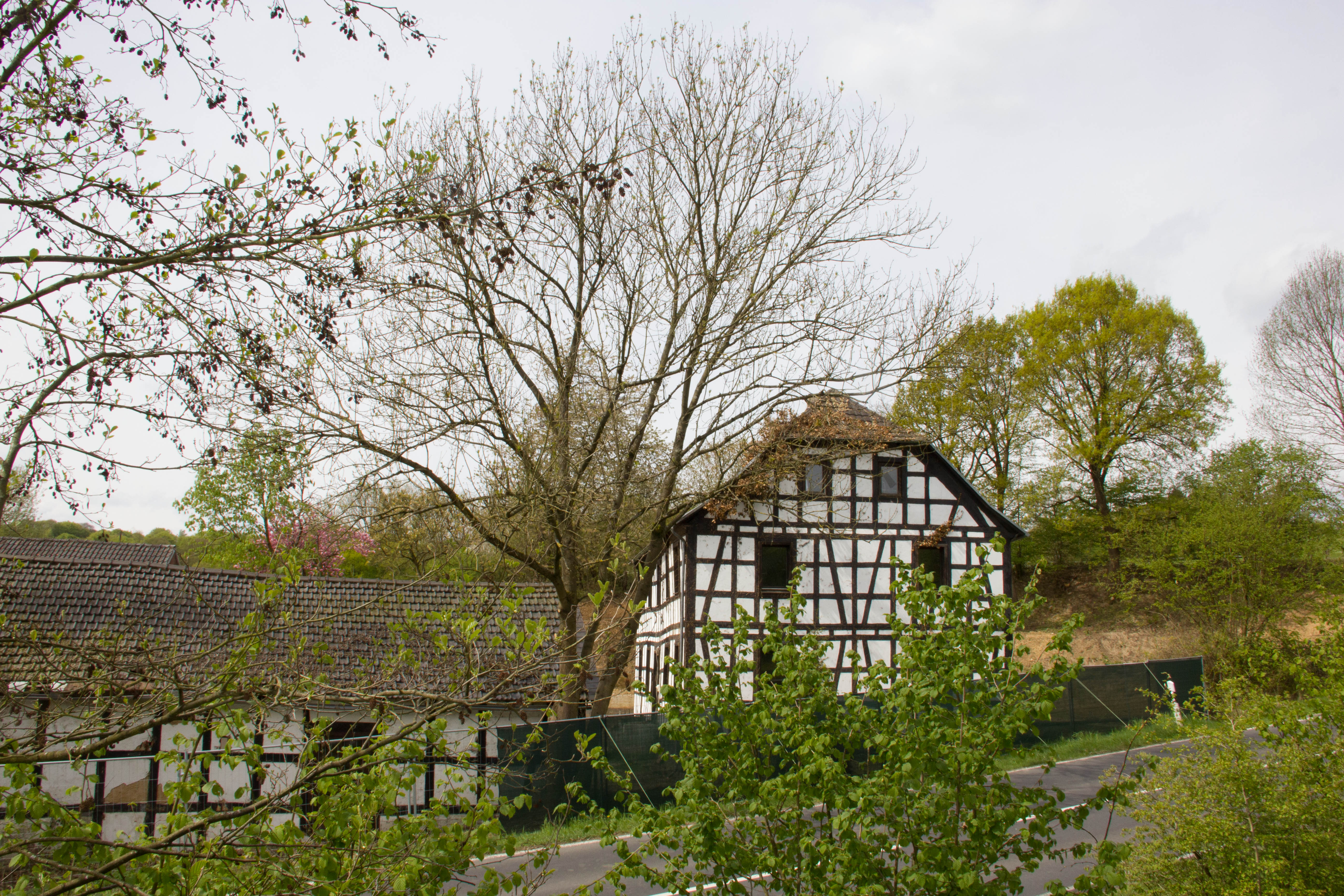 Fachwerkhaus vom Gut Rosauel vom Golfplatz Schloss Auel aus gesehen am 29. April 2015